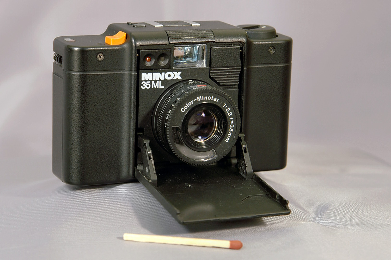 Camera Minox 35 ML